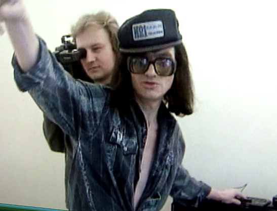 CПМ «Рекорд», репетиция